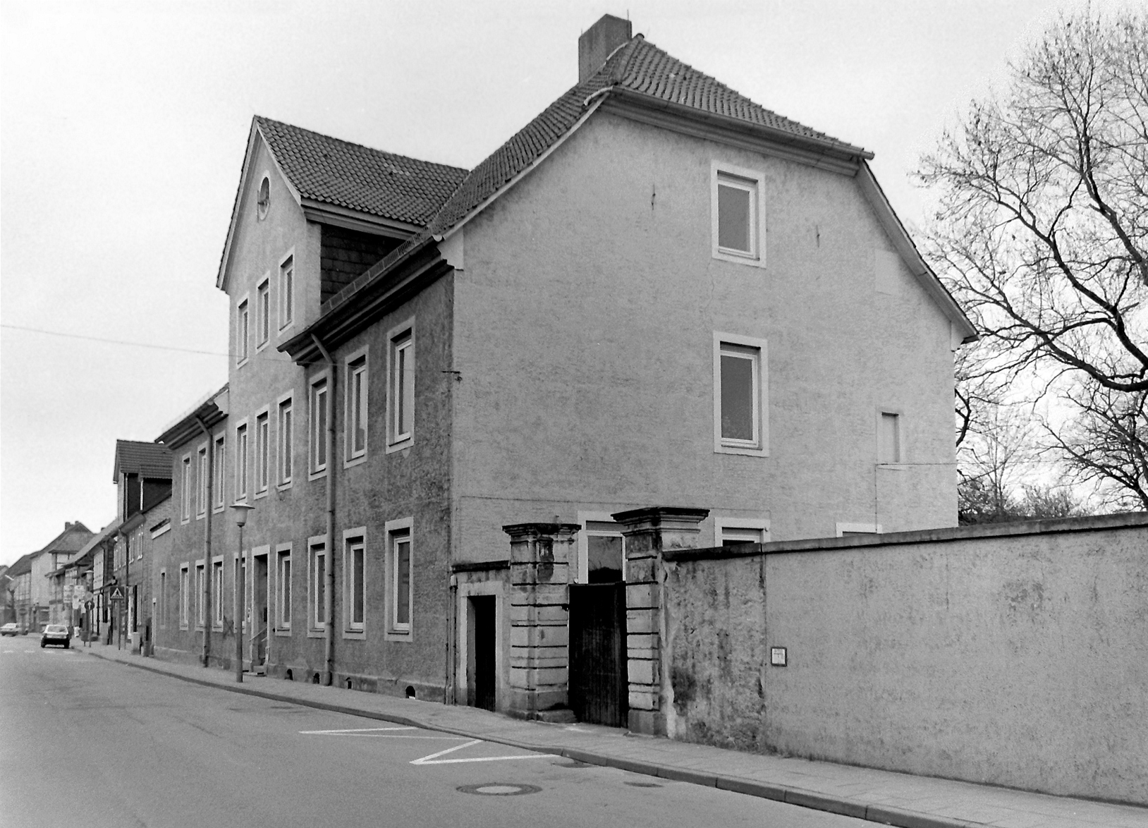 Früheres Amtsgebäude in Vorsfelde